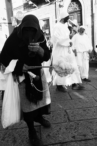 Figura della Filugnana nella Mascara Gadduresa di Calangianus.